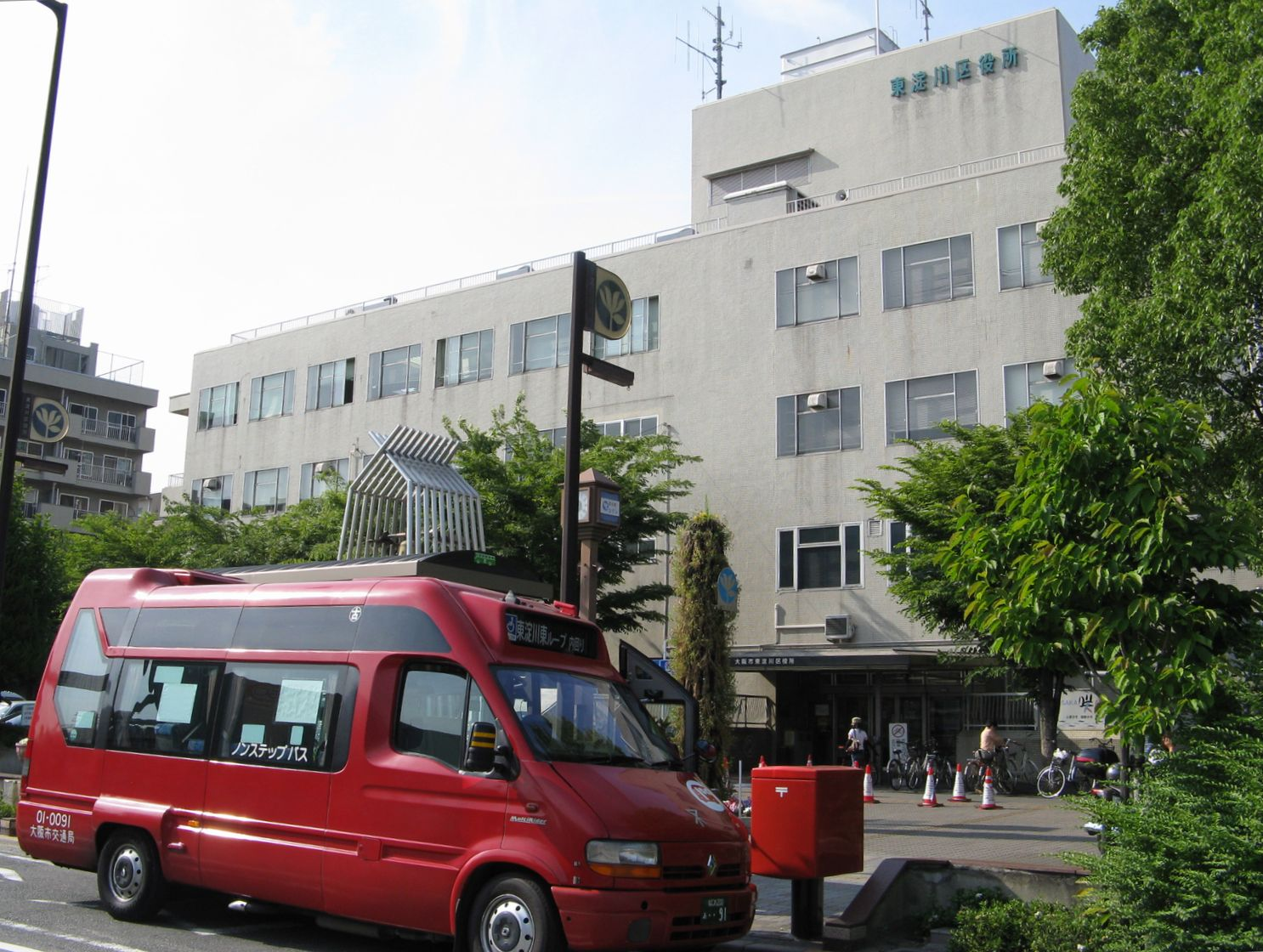 東淀川区役所 手前に東淀川東ループ（内回り）のja:赤バスが停車中